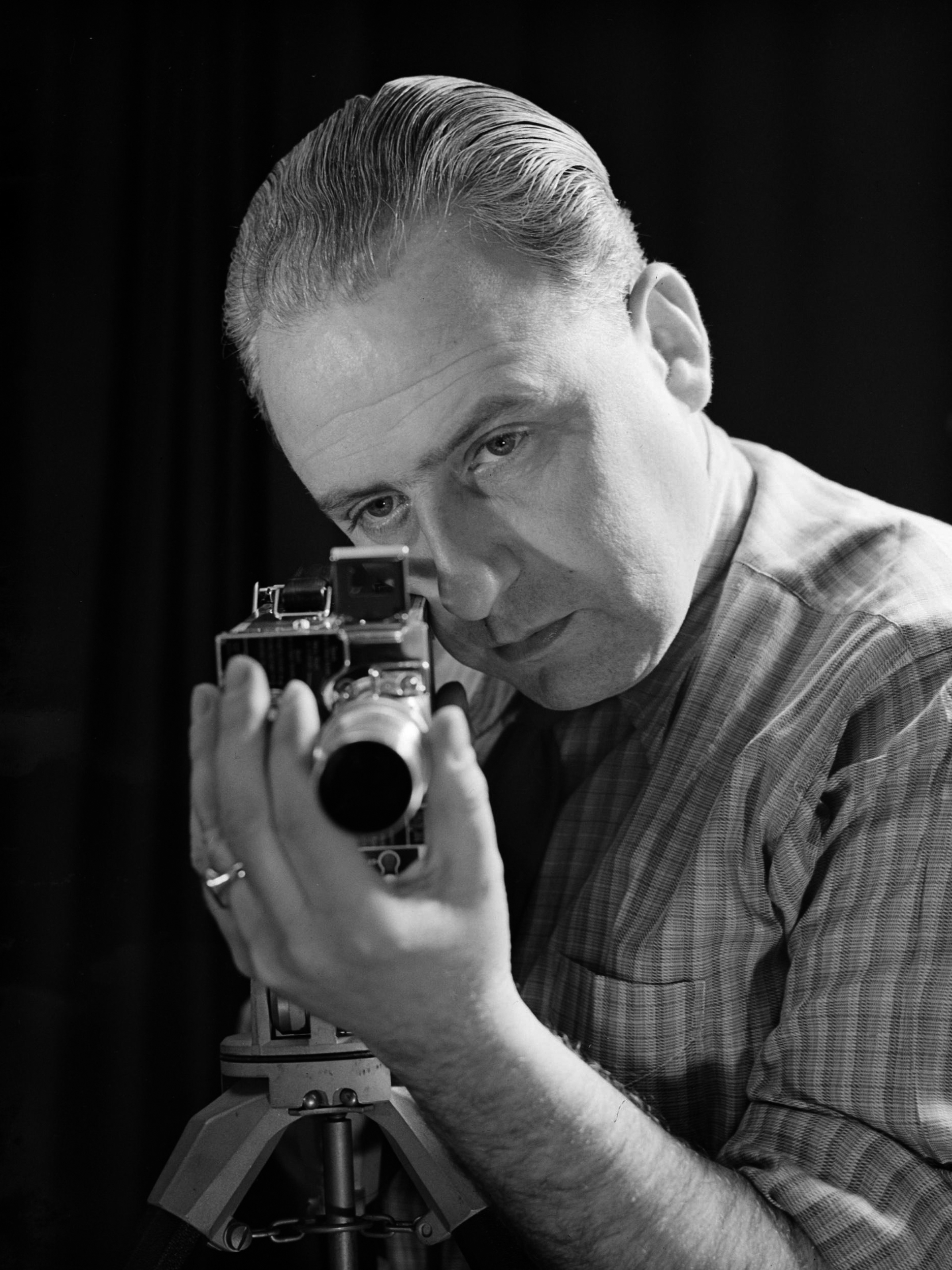 Foto's van Willem van de Poll; Van de Poll met een camera